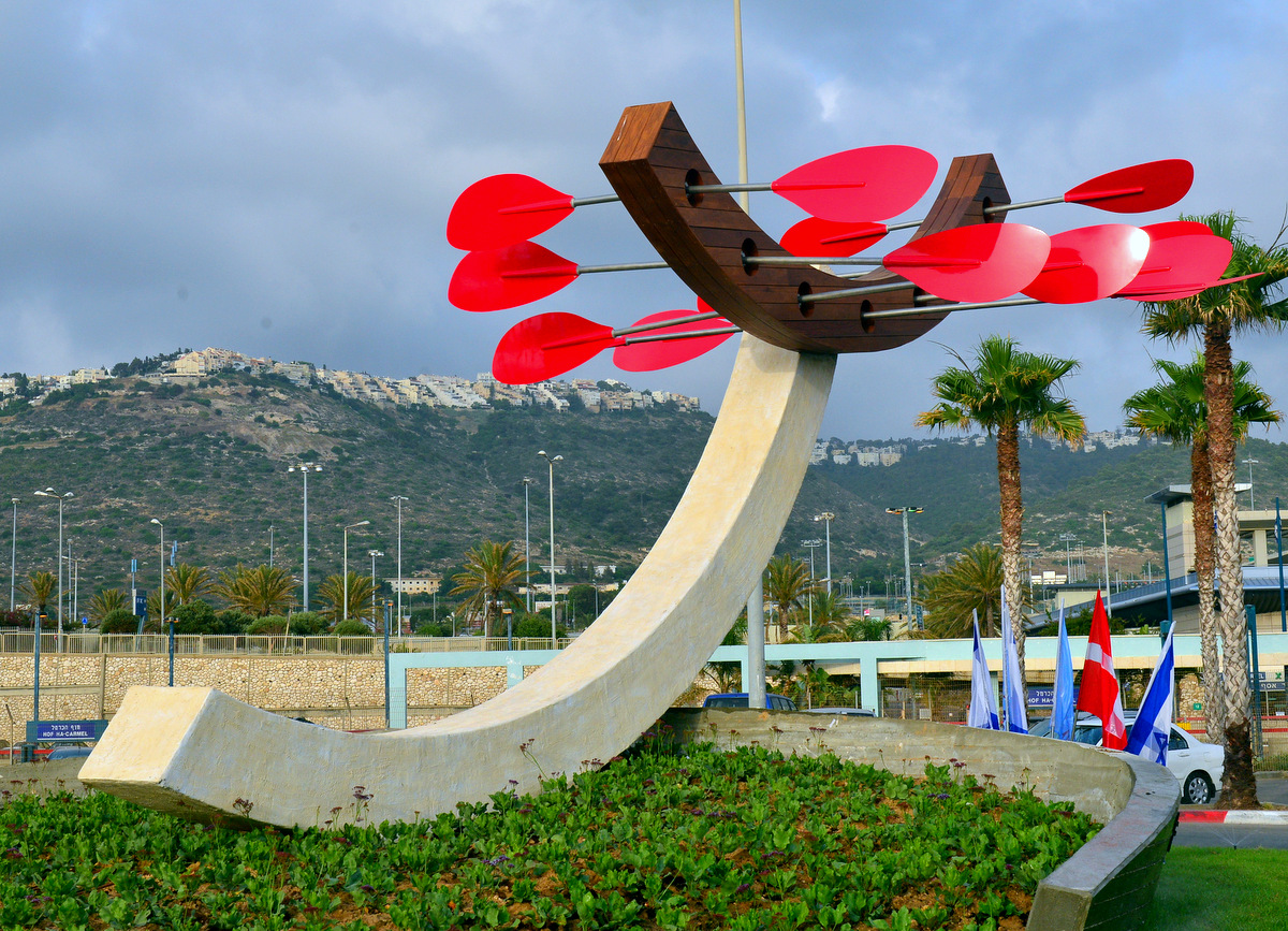 The Murmur of the Seas